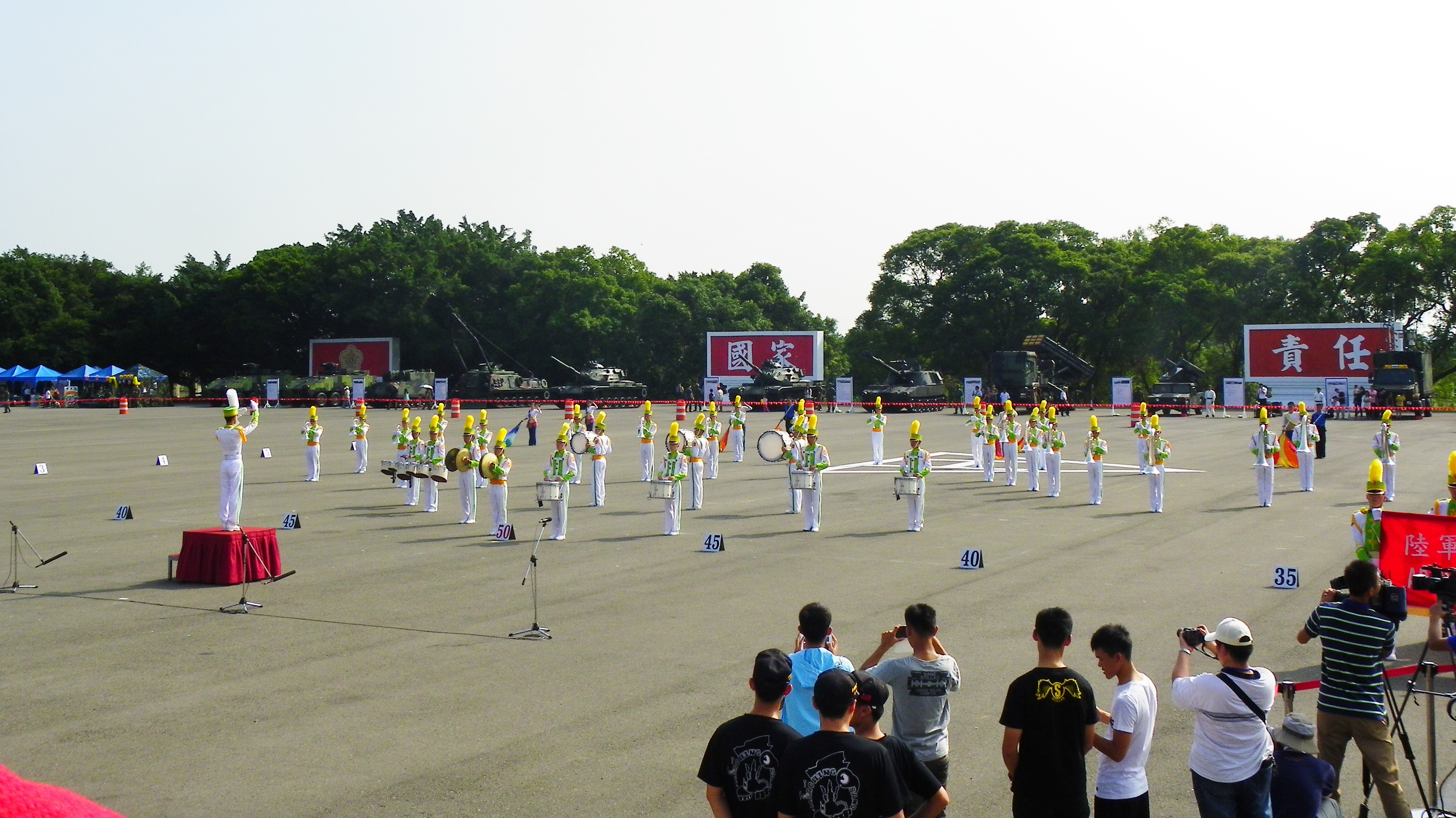 中文（台灣）: 隊旗退場後，指揮就位，開始演奏的陸專鼓號樂旗隊。